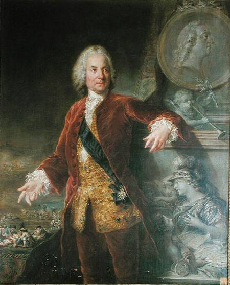 Portrait of Germain Pichault de La Martinière (1697-1783), French surgeon